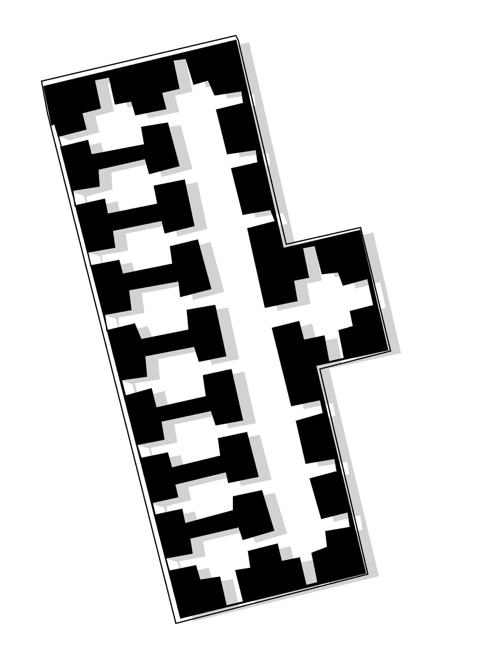 Monastary at Beiktano-myo